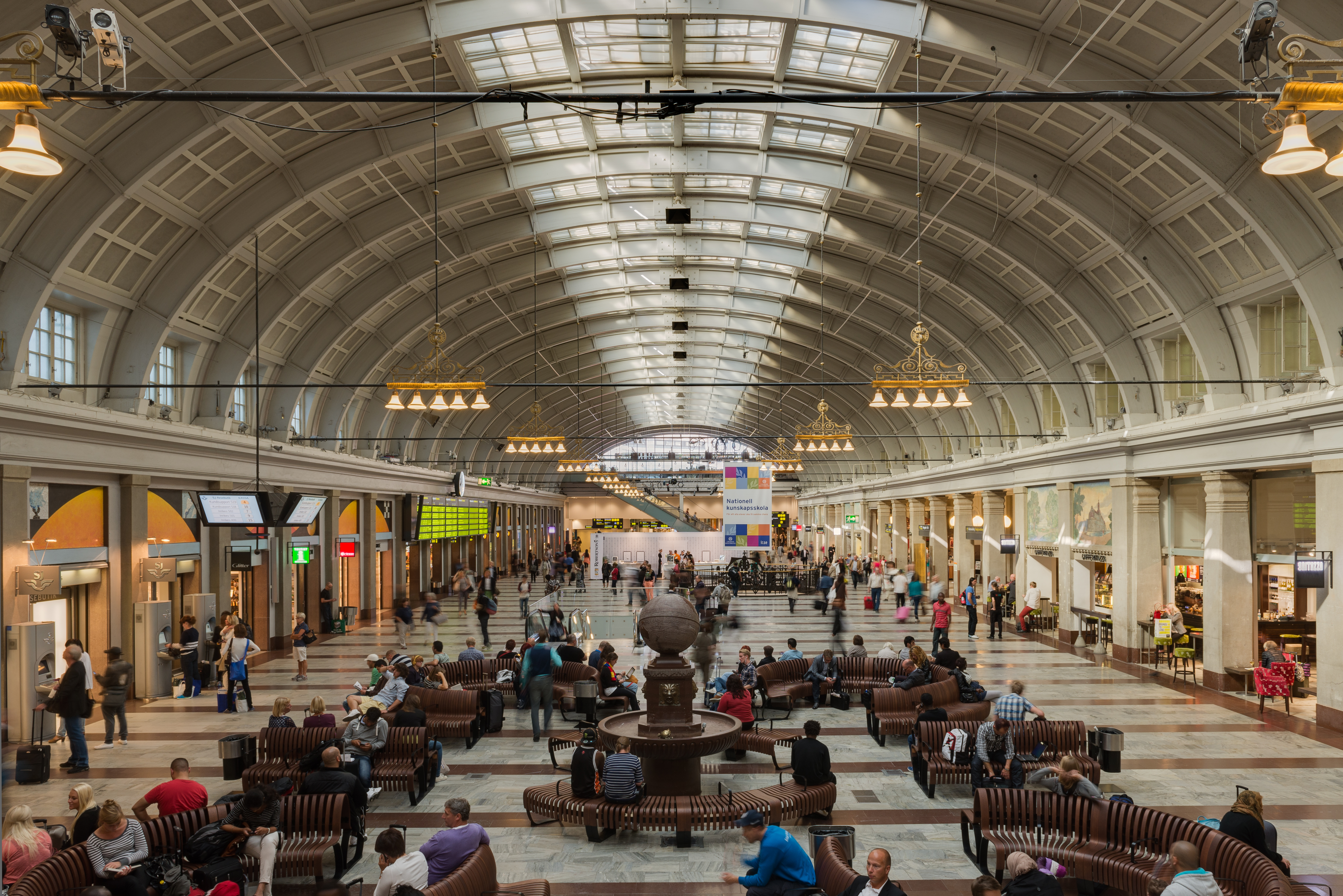 Stockholms centralstation (Stockholm Central station). (Norrmalm 5:3, f.d. 5:1)